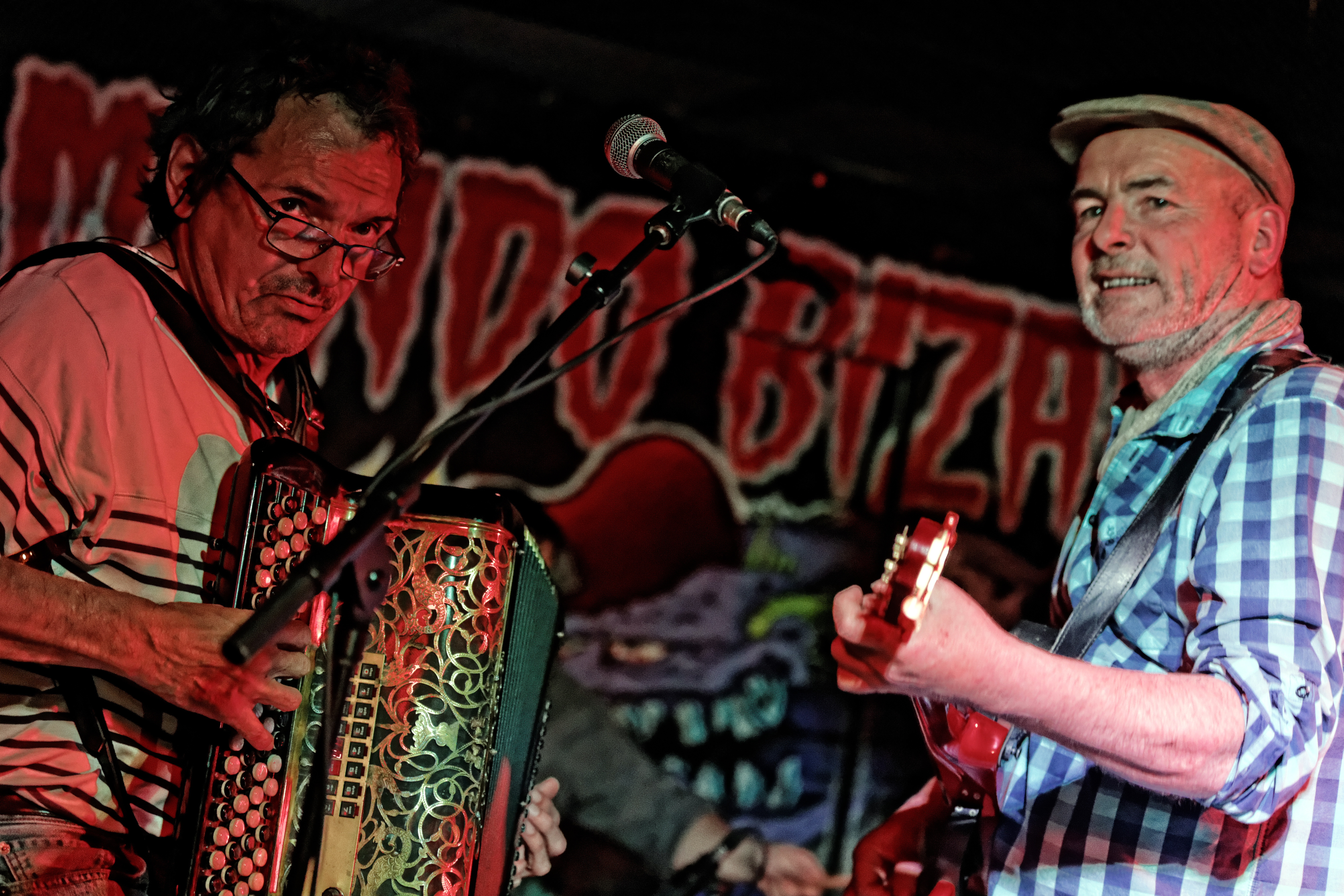 Première représentation publique de la nouvelle formation Red Cardell, démarrant sa (re)tournée au Mondo Bizarro à Rennes le 27 avril 2016.